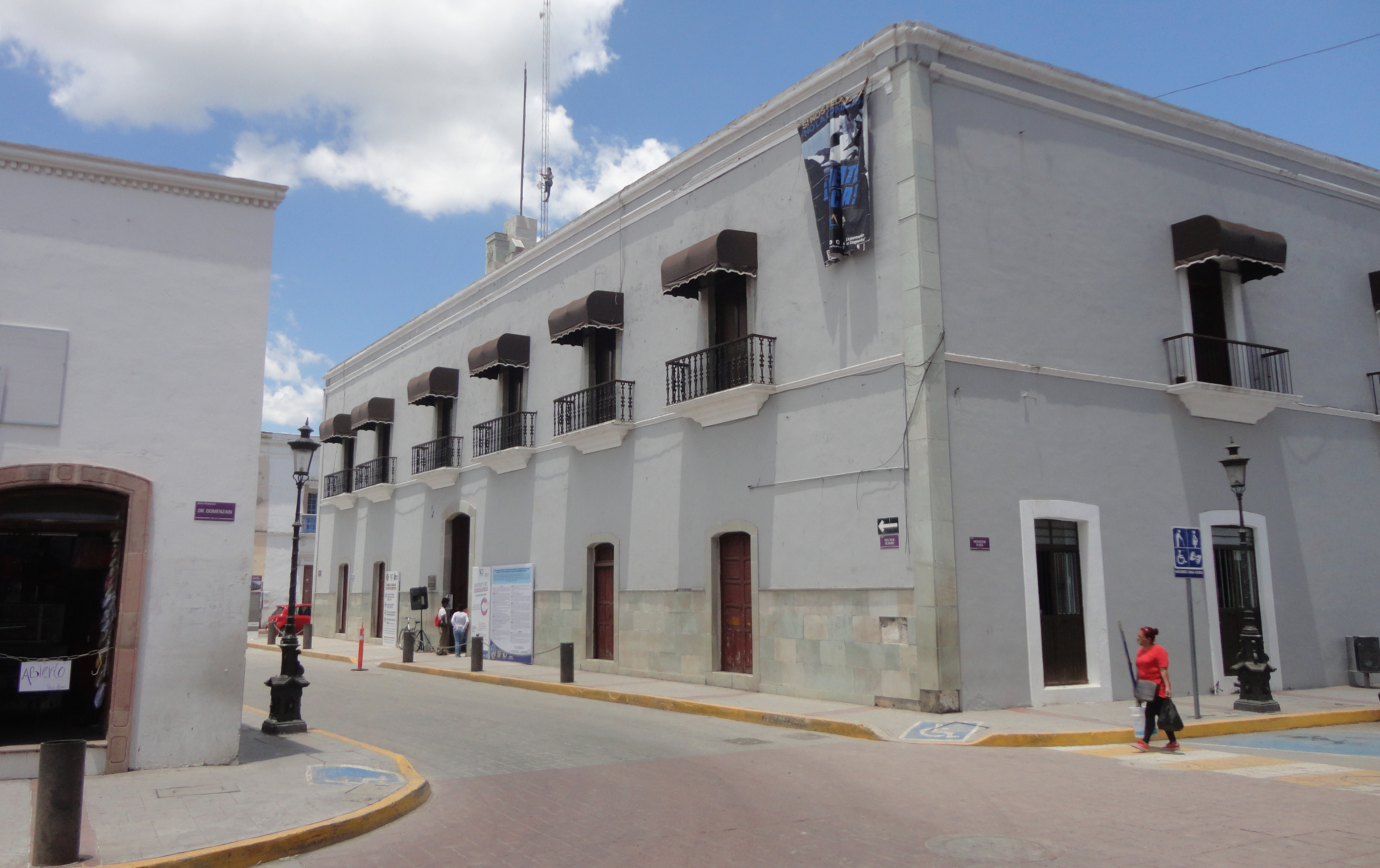 Presidencia Municipal - Silao, Guanajuato, México.